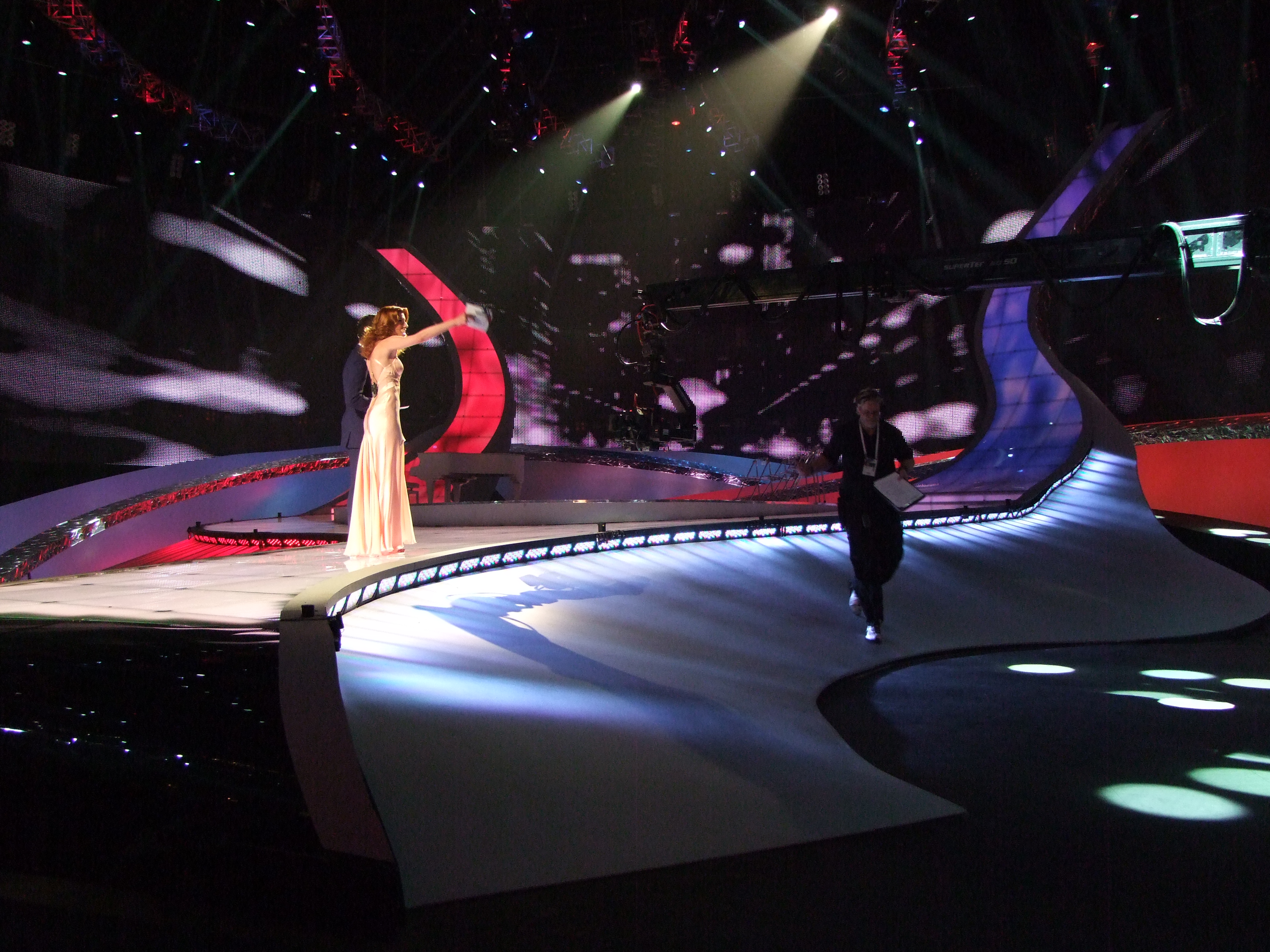 Semifinal 1 EUROVISION 2008